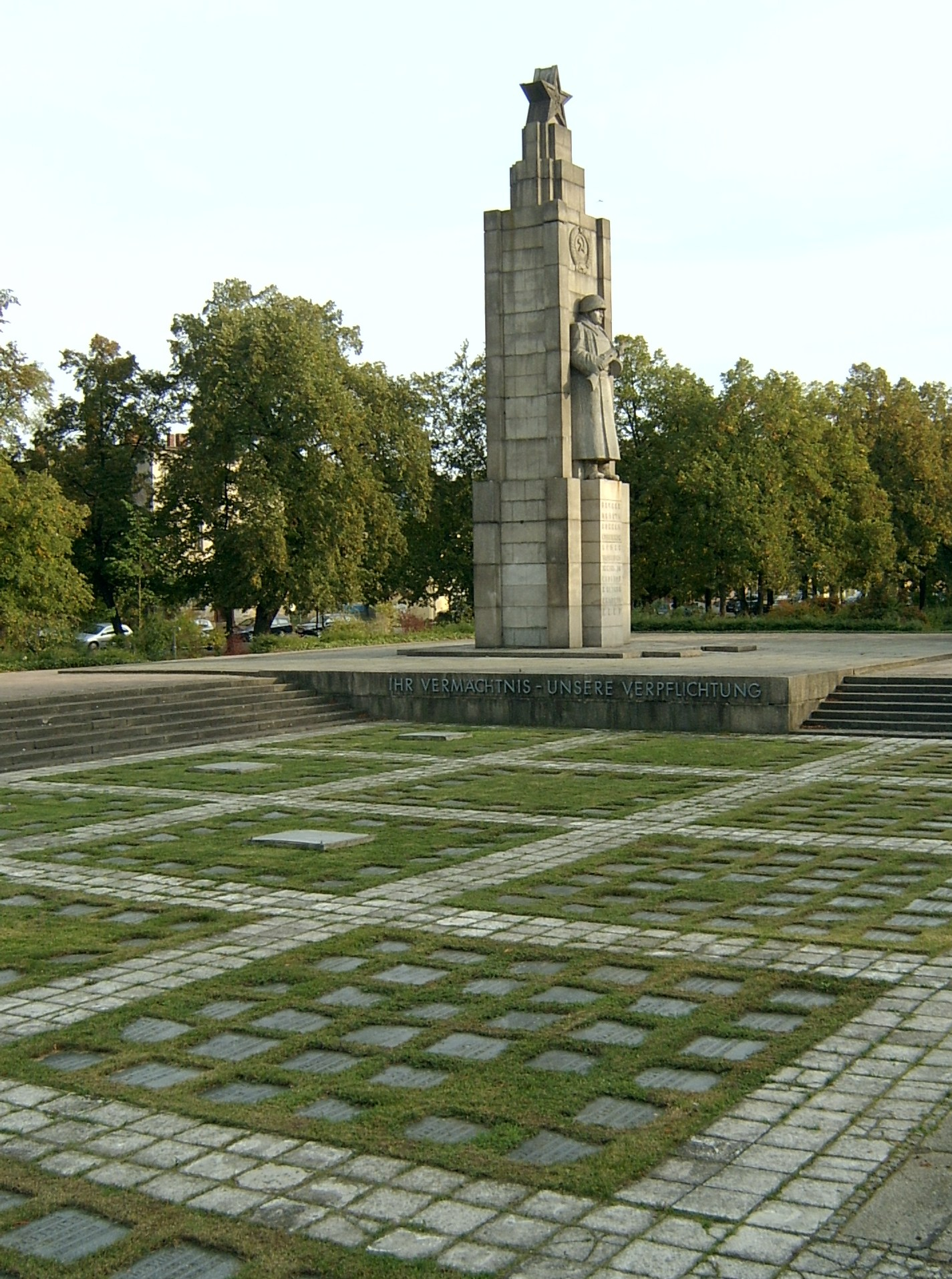 Mahnmal für gefallene sowjetische Soldaten des Zweiten Weltkriegs. Das Manhnmal findet sich im Park südlich der Gertraudenkirche. Der Soldat blickt Richtung Westen